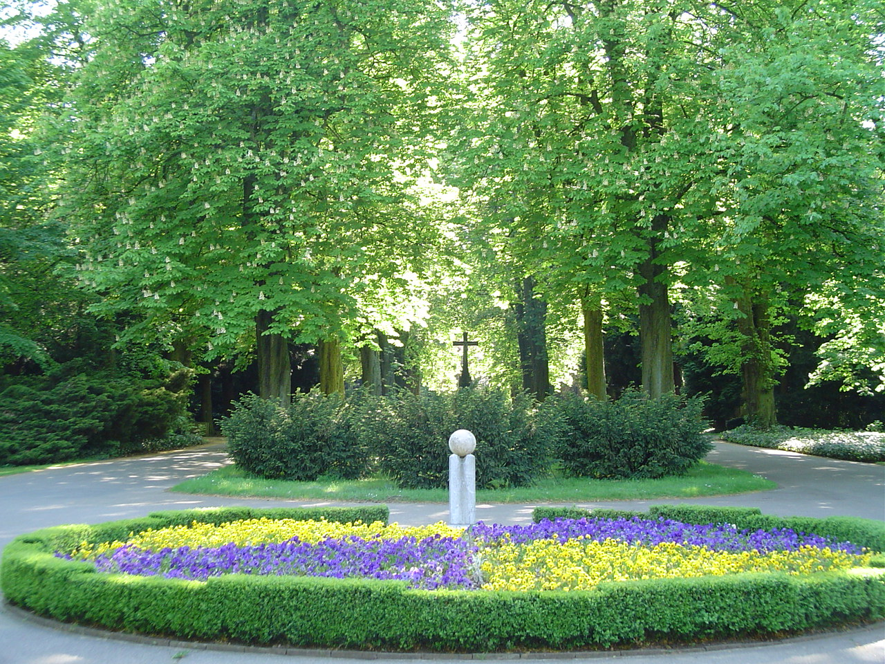 Südfriedhof (Köln)